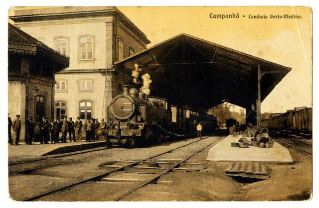 Campanha comboio porto medina